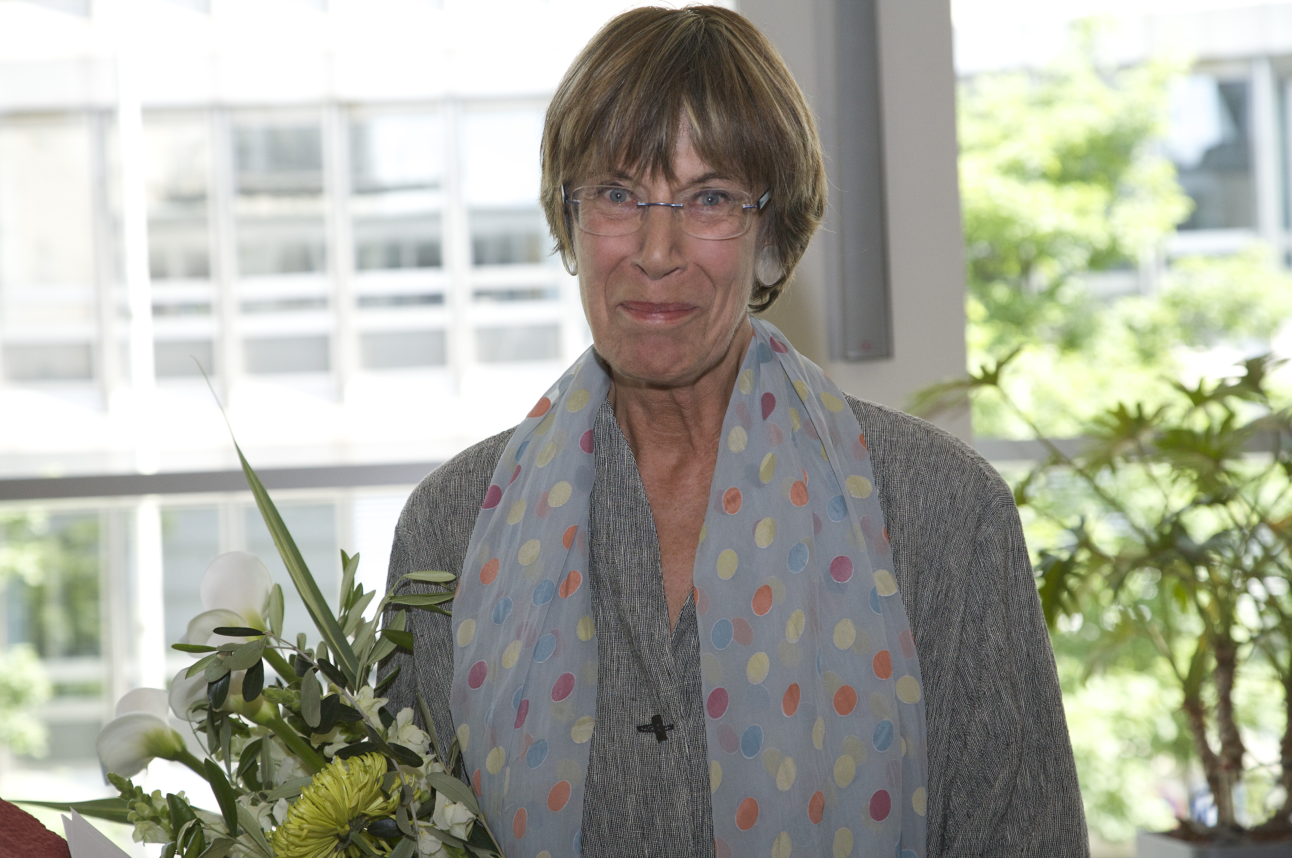 Porträt mit Blumen